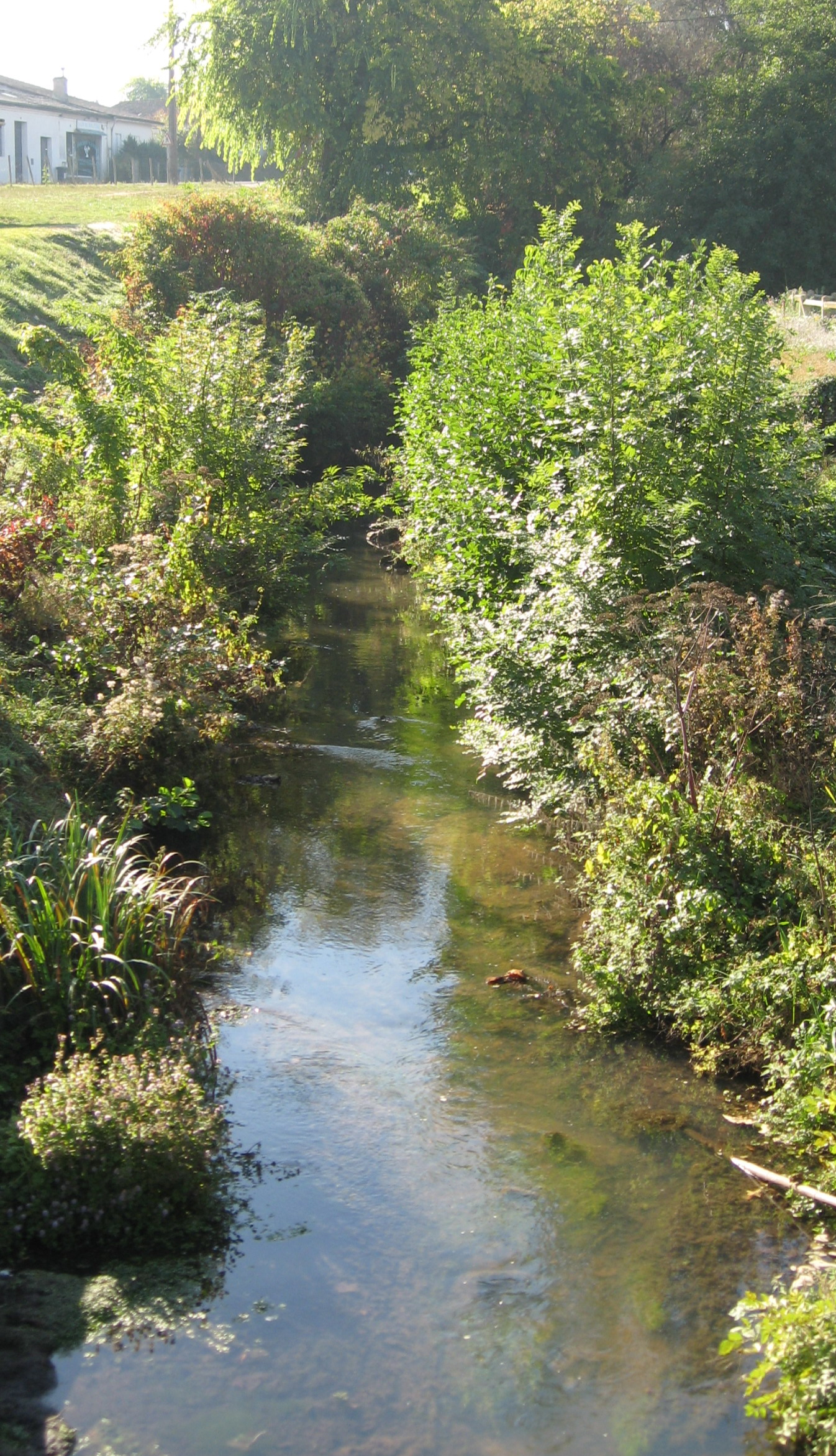 La rivière Eau Blanche à Léognan